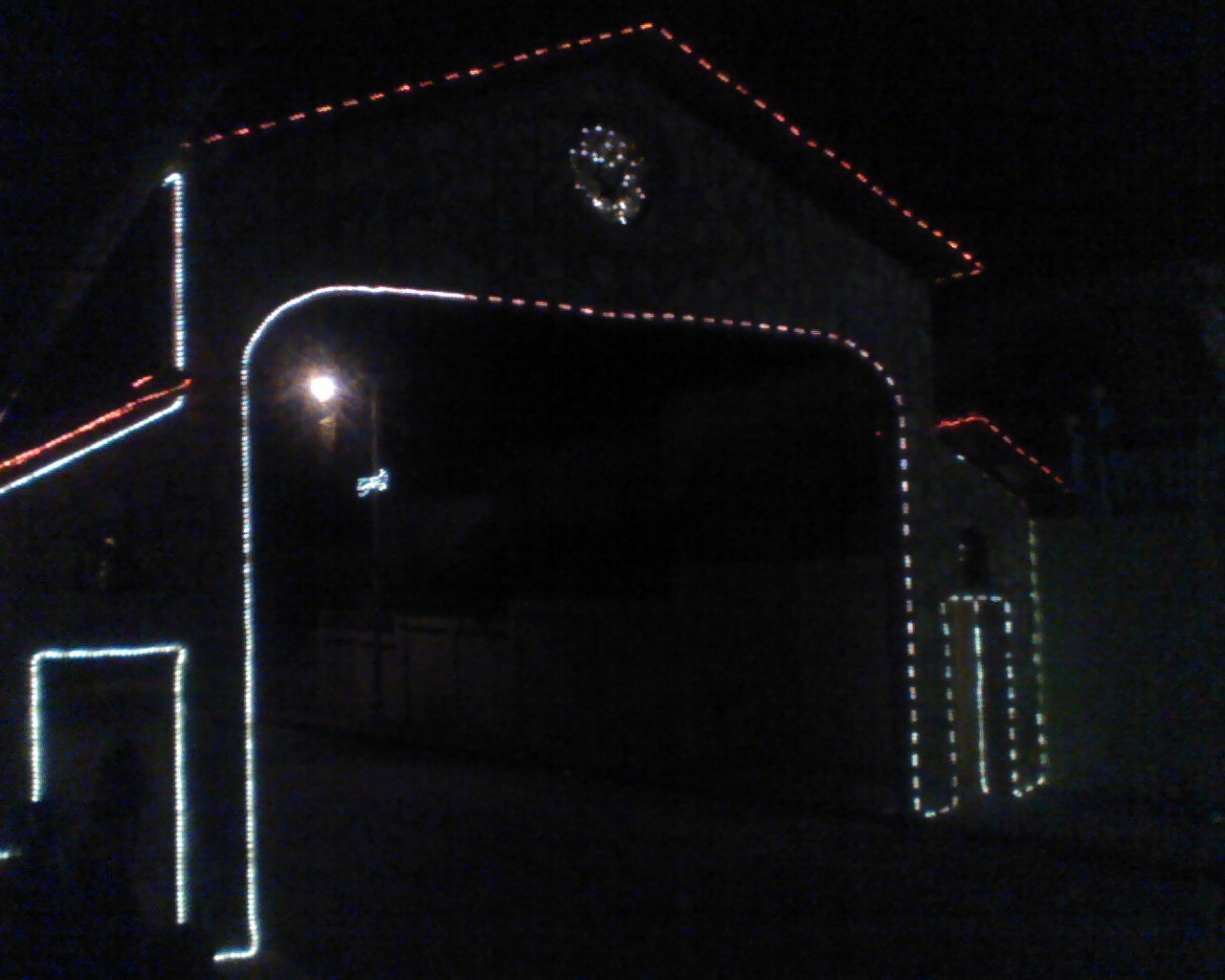 Mcpio FM